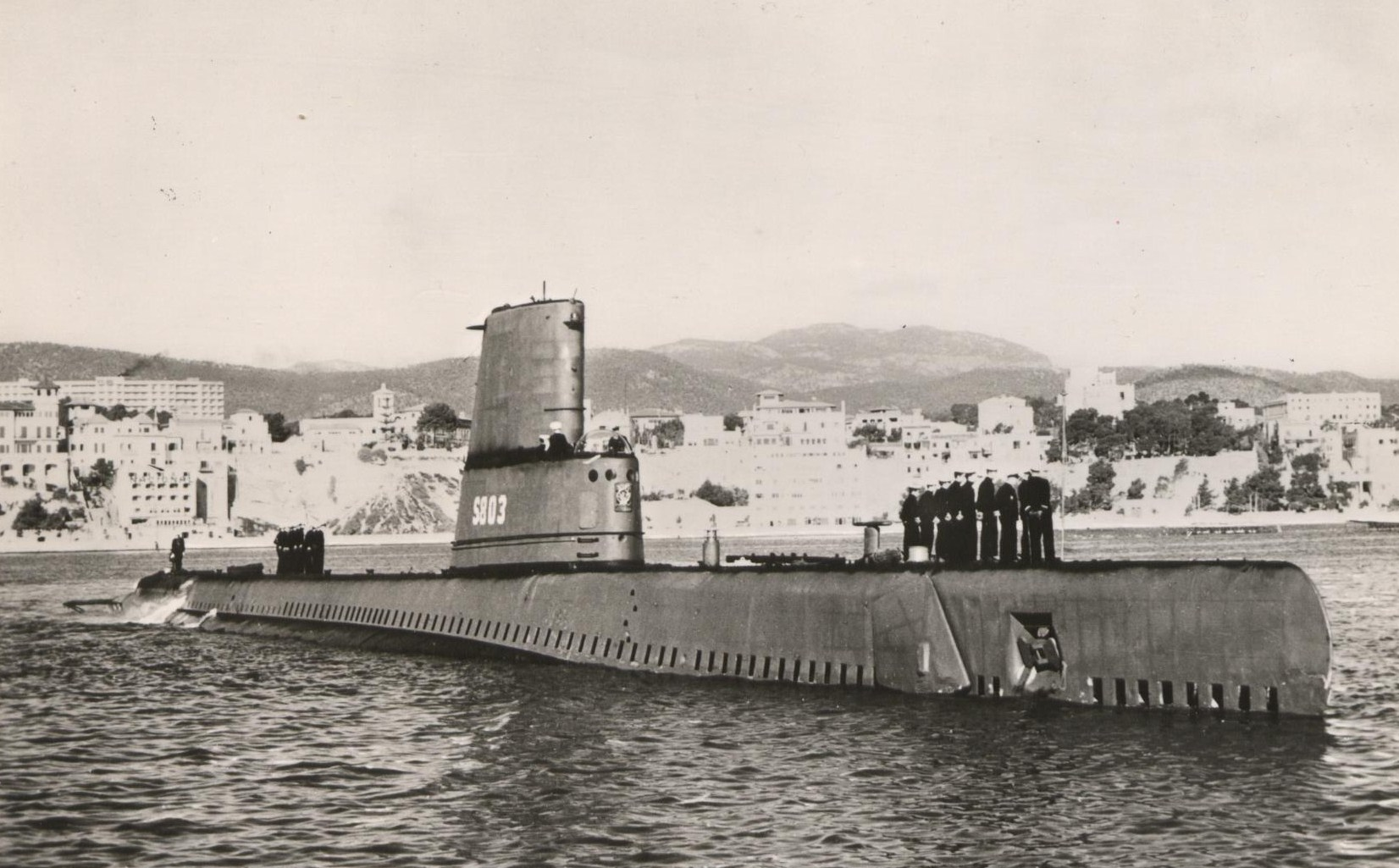 Hr Ms Onderzeeboot Zeeleeuw S803 van de Koninklijke Marine te Palma Majorca. Dit was het zusterschip van Hr Ms Onderzeeboot Walrus. De Zeeleeuw werd in februari 1953 in dienst genomen bij de Koninklijke Marine. Oorspronkelijke naam was de Hawksbill (USA).